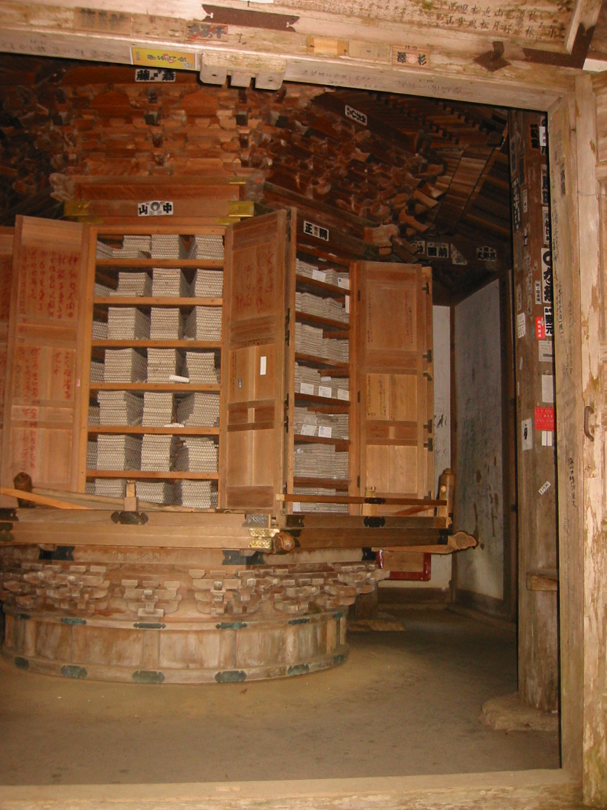 谷汲山輪蔵華厳寺